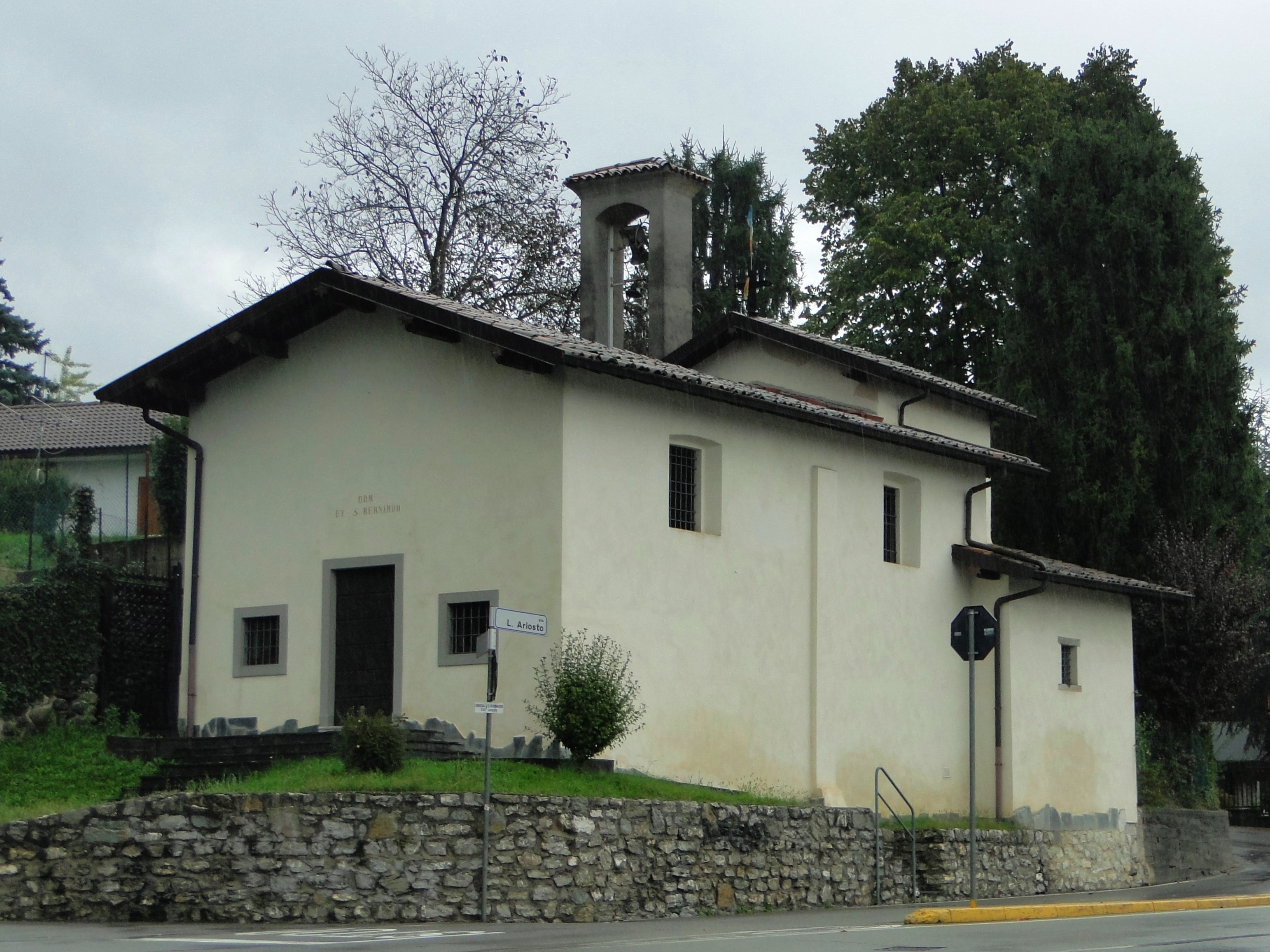 Chiesa di San Bernardo in Bruseto, Bondo Petello di Albino (BG)